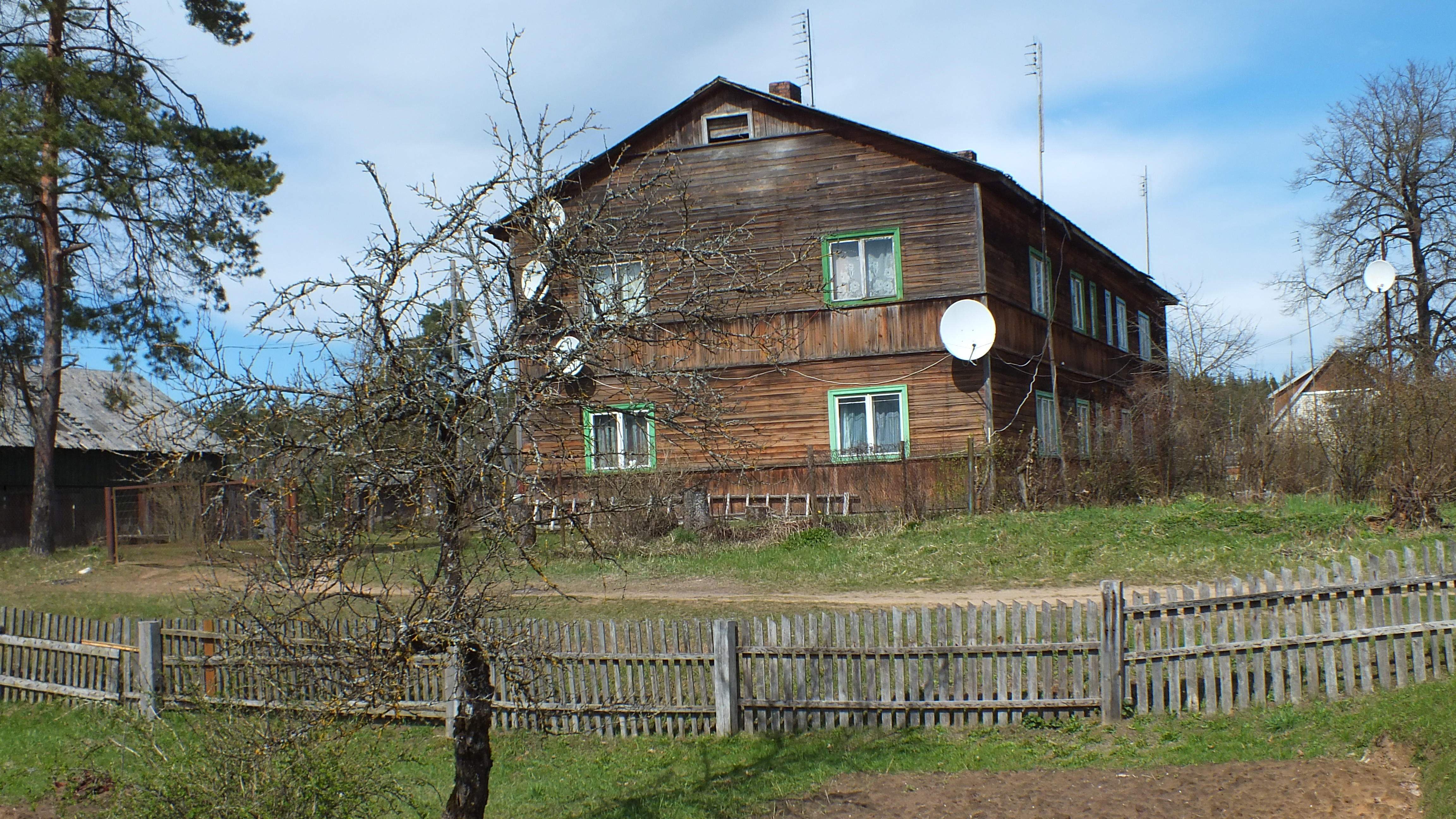 Māja Vijolīšu ielā